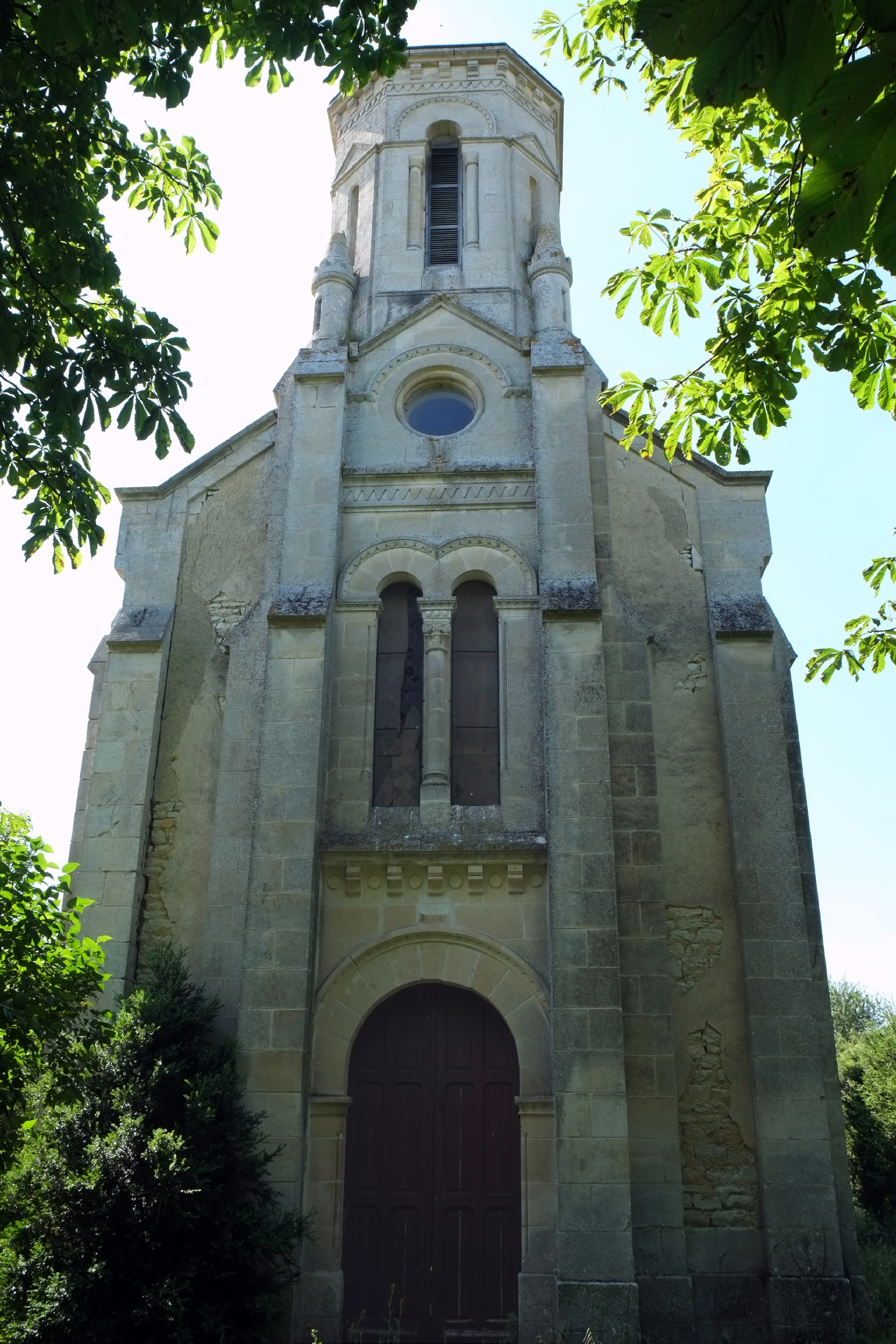 Église Saint-Martin La Grève-sur-Mignon Charente-Maritime France